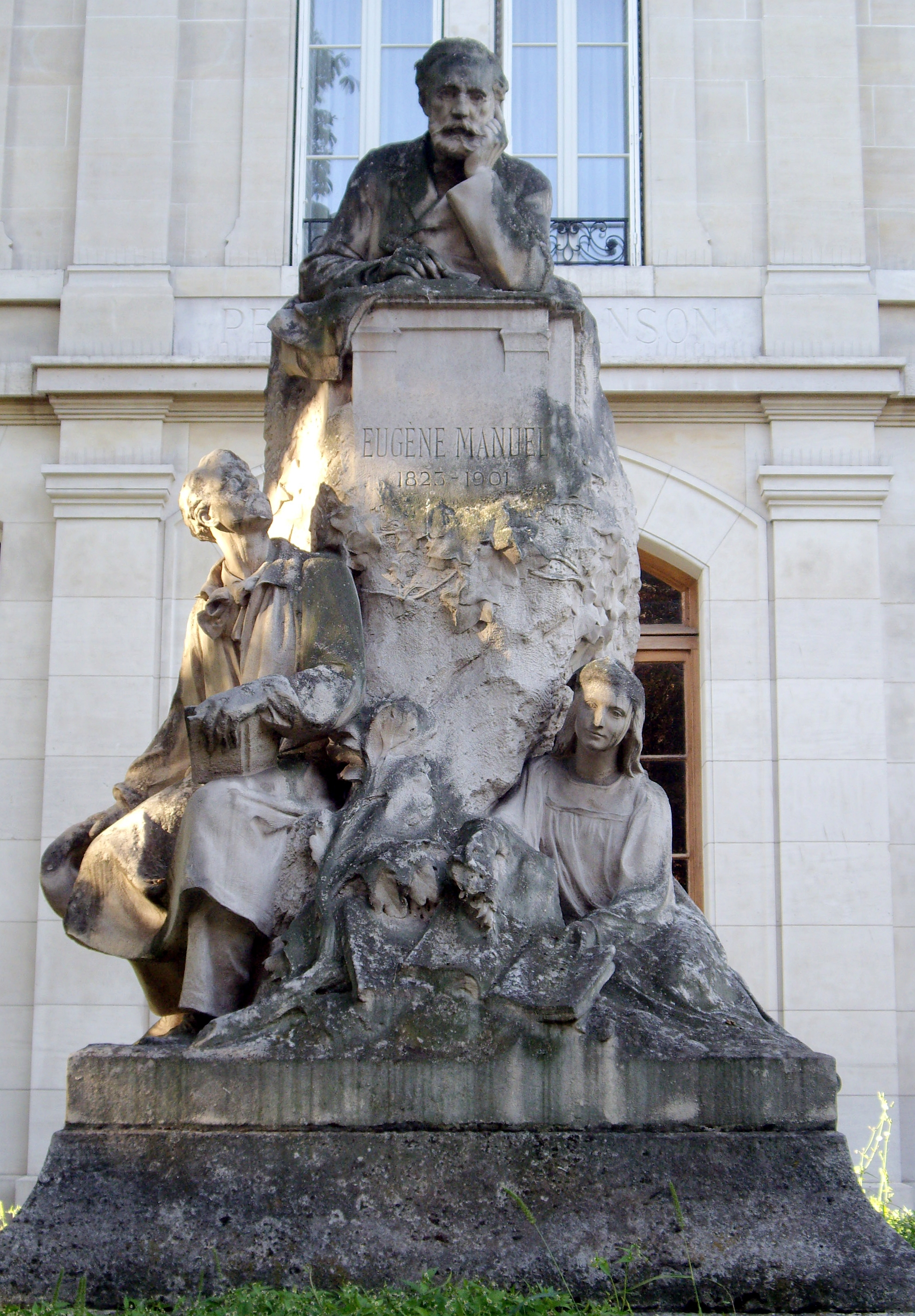 Monument à Eugène Manuel (1823-1901) par Gustave Michel (1881-1924), inauguré le 5 juillet 1908 dans la cour du « petit lycée » Janson-de-Sailly, 46 avenue Georges Mandel, Paris 16e.